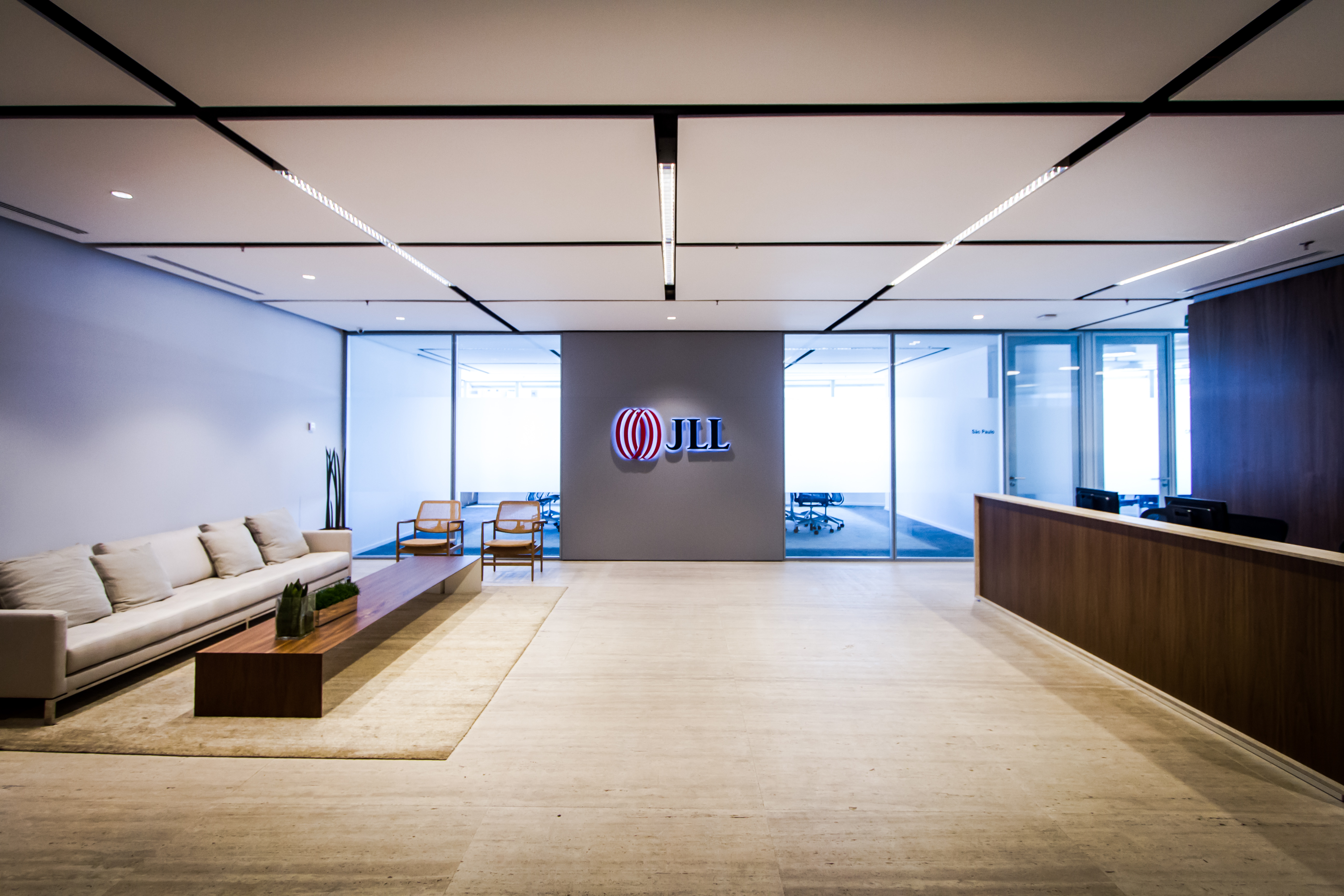 Escritório localizado no São Paulo Corporate Towers.